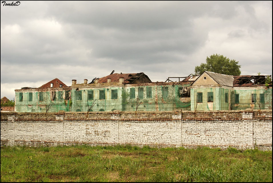 Нароўля. Чырвоны Мазыранін